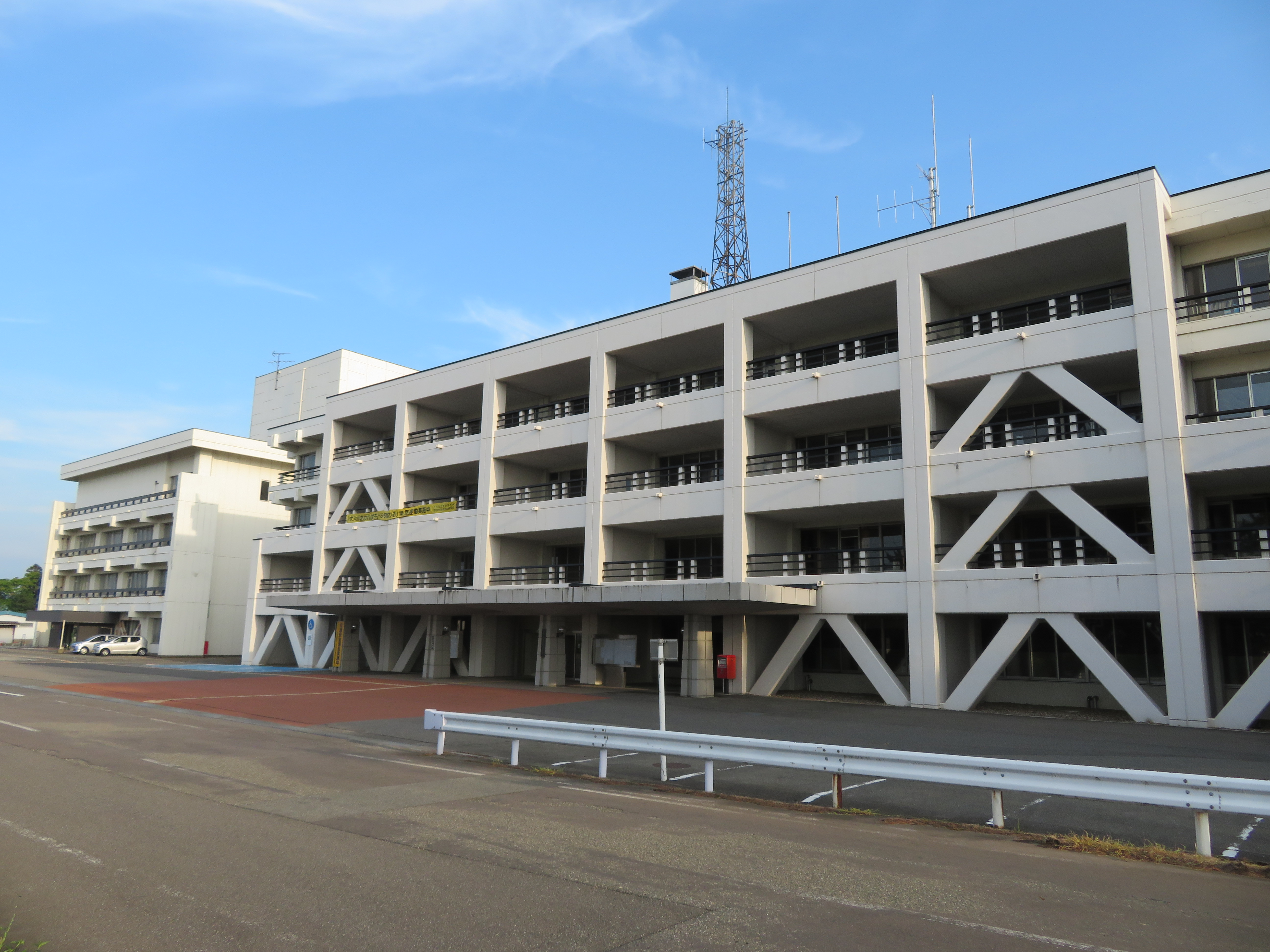 山形県三川町に所在する山形県庄内総合支庁庁舎